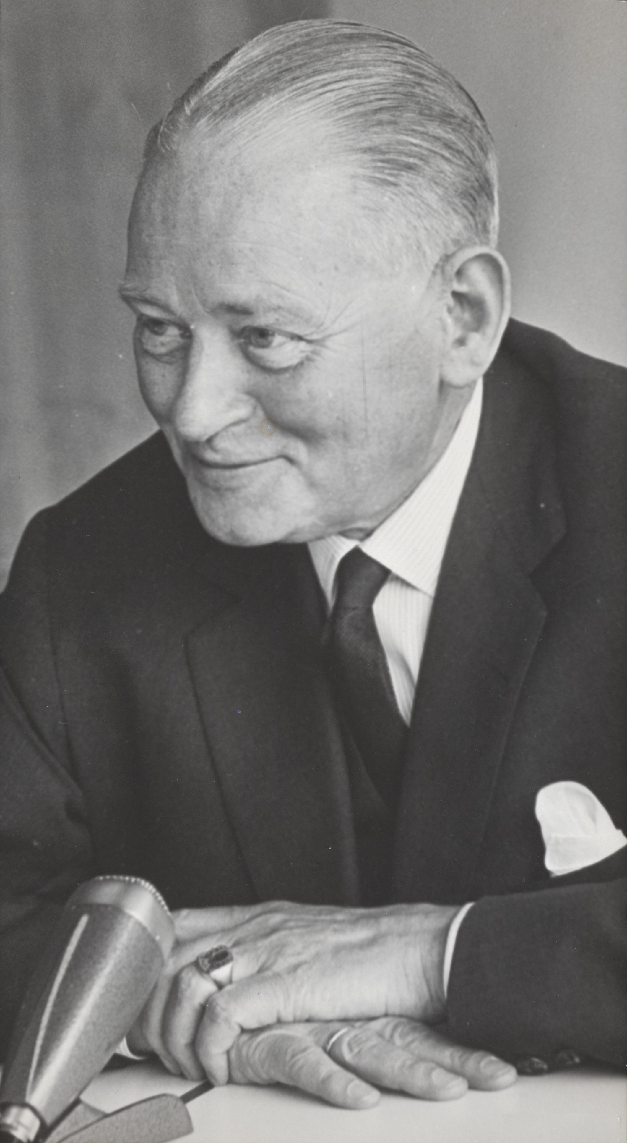 Collectie / Archief : Fotocollectie Elsevier Reportage / Serie : [ onbekend ] Beschrijving : Secretaris-generaal van de NATO, mr. D.U. Stikker, tijdens een persconferentie op Schiphol. Hij maakt een afscheidstoernee langs alle NATO-landen Datum : 8 juli 1964 Locatie : Noord-Holland, Schiphol Trefwoorden : internationale organisaties, politici, portretten Persoonsnaam : Stikker, Dirk Fotograaf : Pot, Harry / Anefo Auteursrechthebbende : Nationaal Archief Materiaalsoort : Foto (zwart/wit) Nummer archiefinventaris : bekijk toegang 2.24.05.02 Bestanddeelnummer : 093-0129